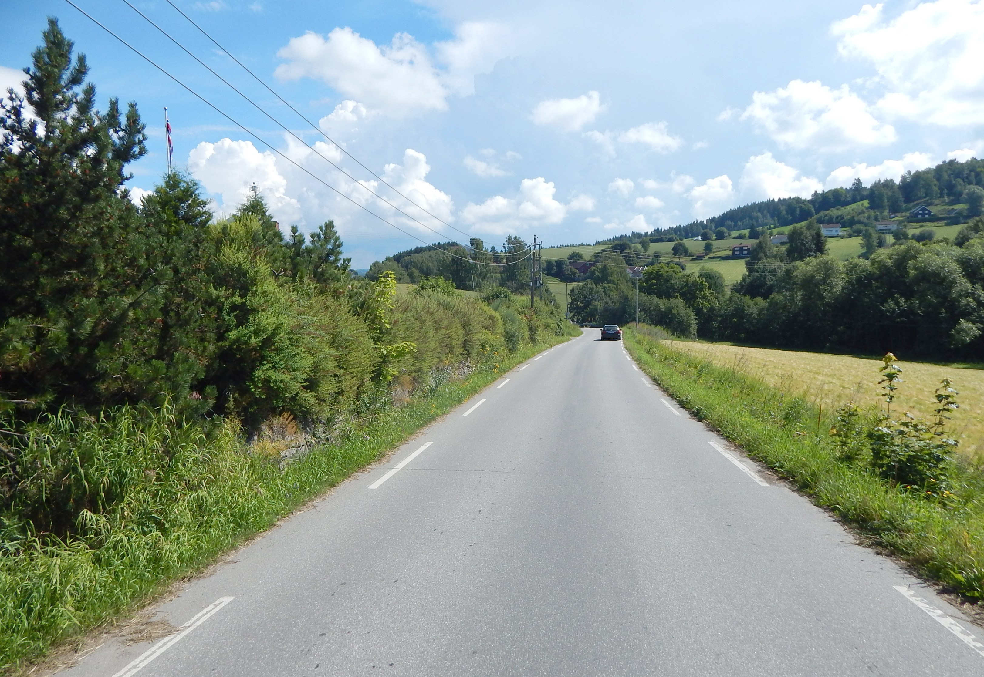 Vikavegen (FV2314, tidl. FV40) like utenfor Brandbu